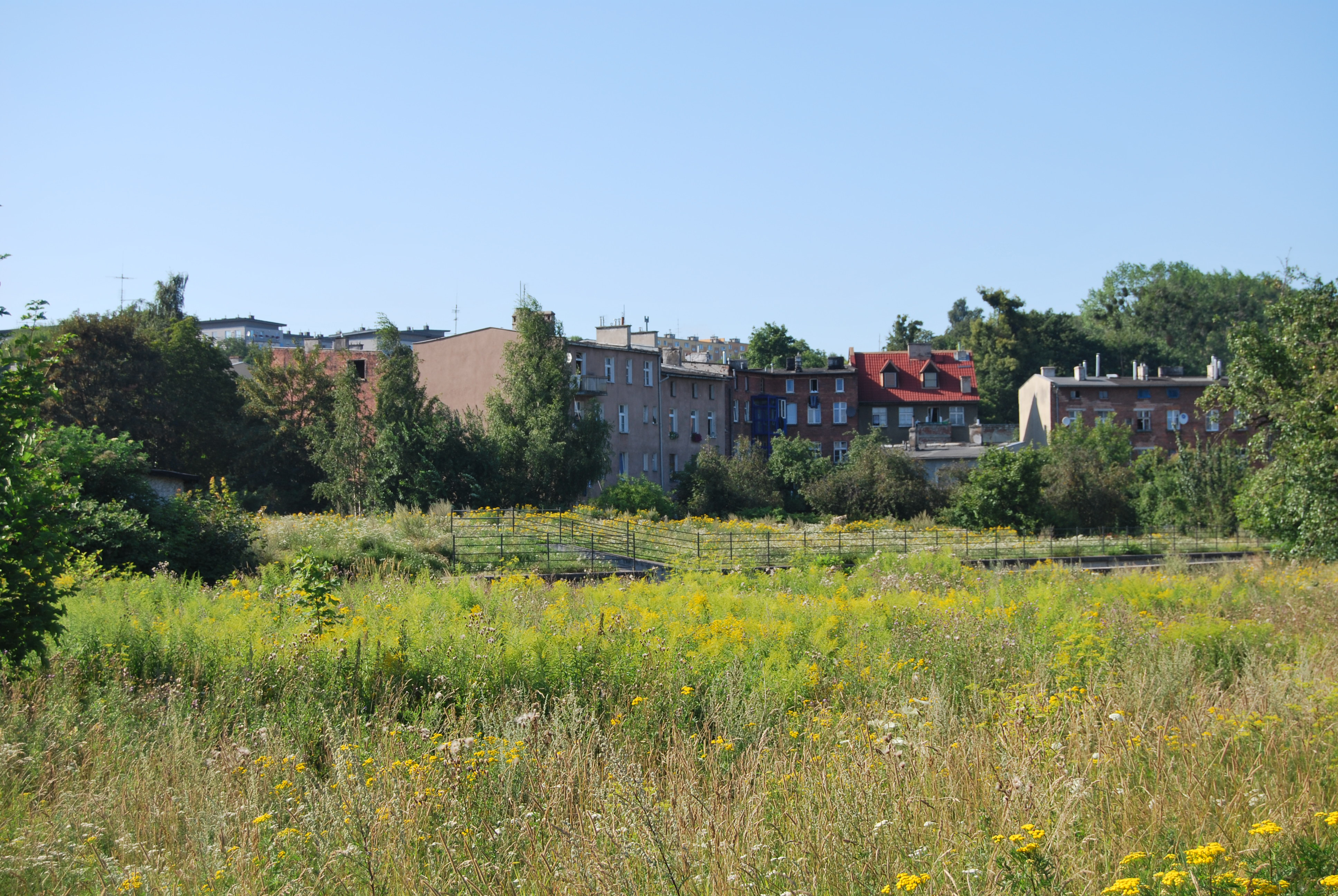 Gdańsk Orunia (widok) 2009 r.